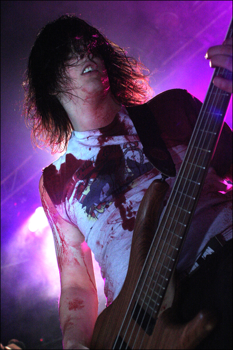 Mean Fiddler